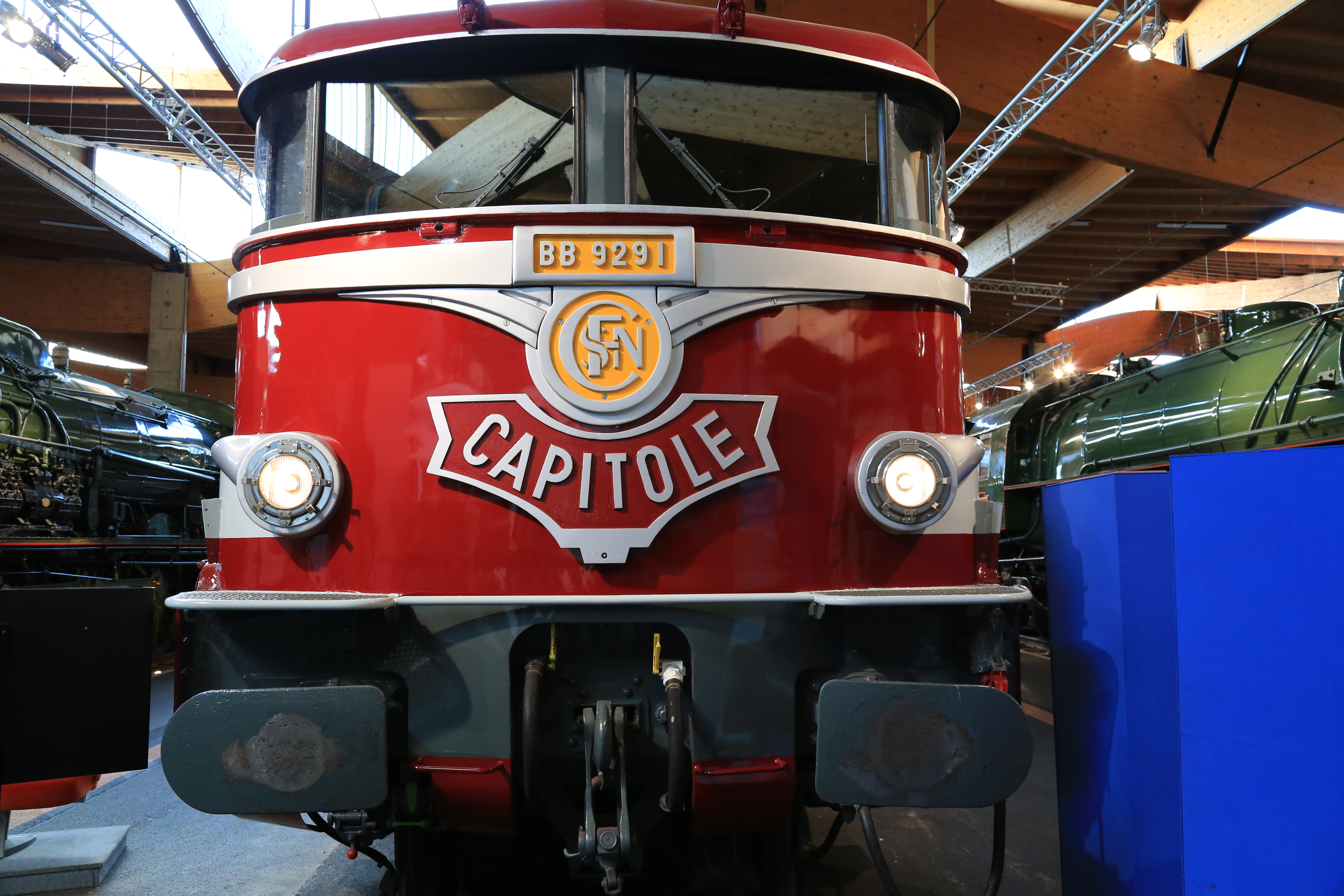 Musée du train - Mulhouse - BH5A6495